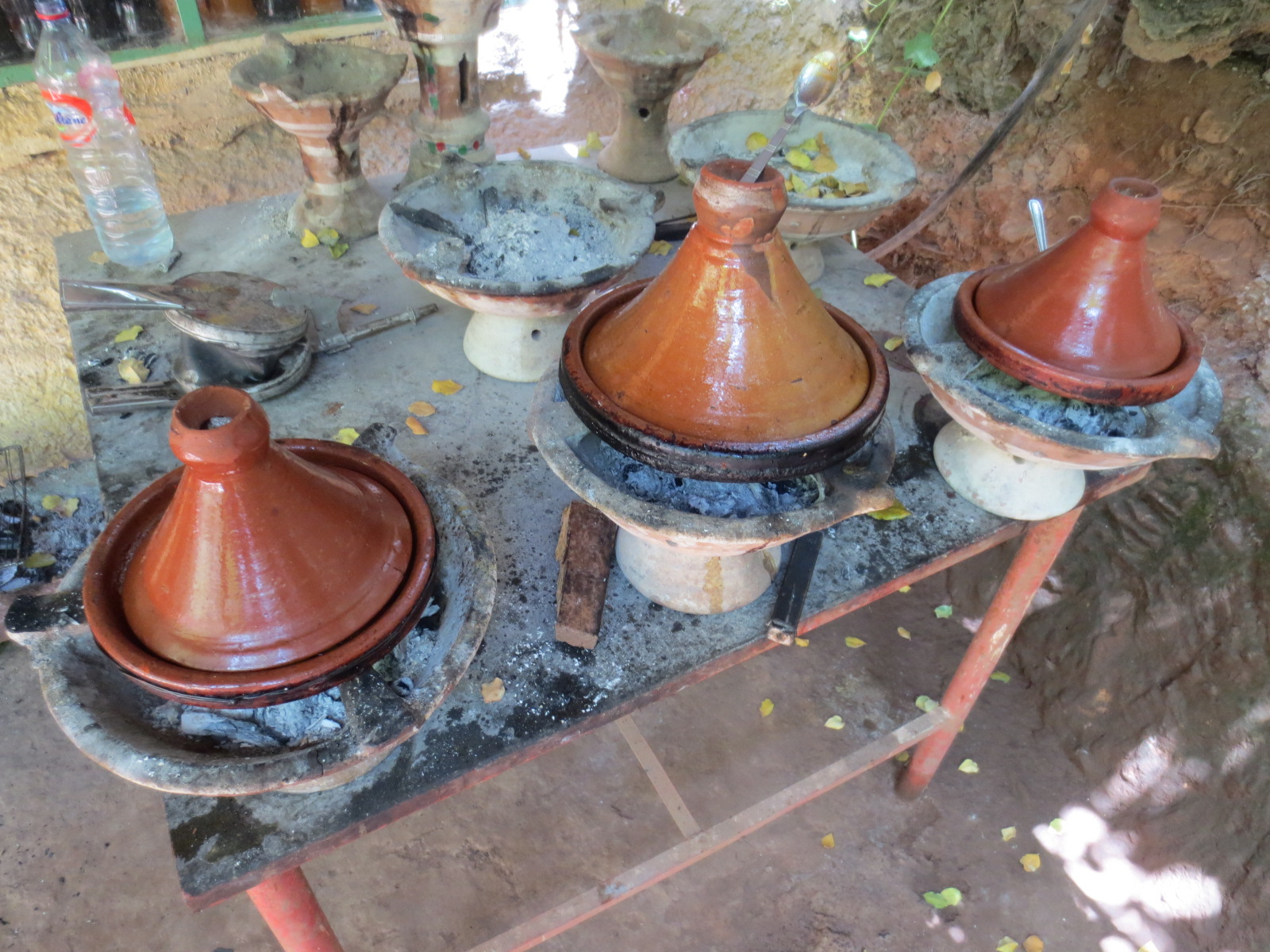 Tajine